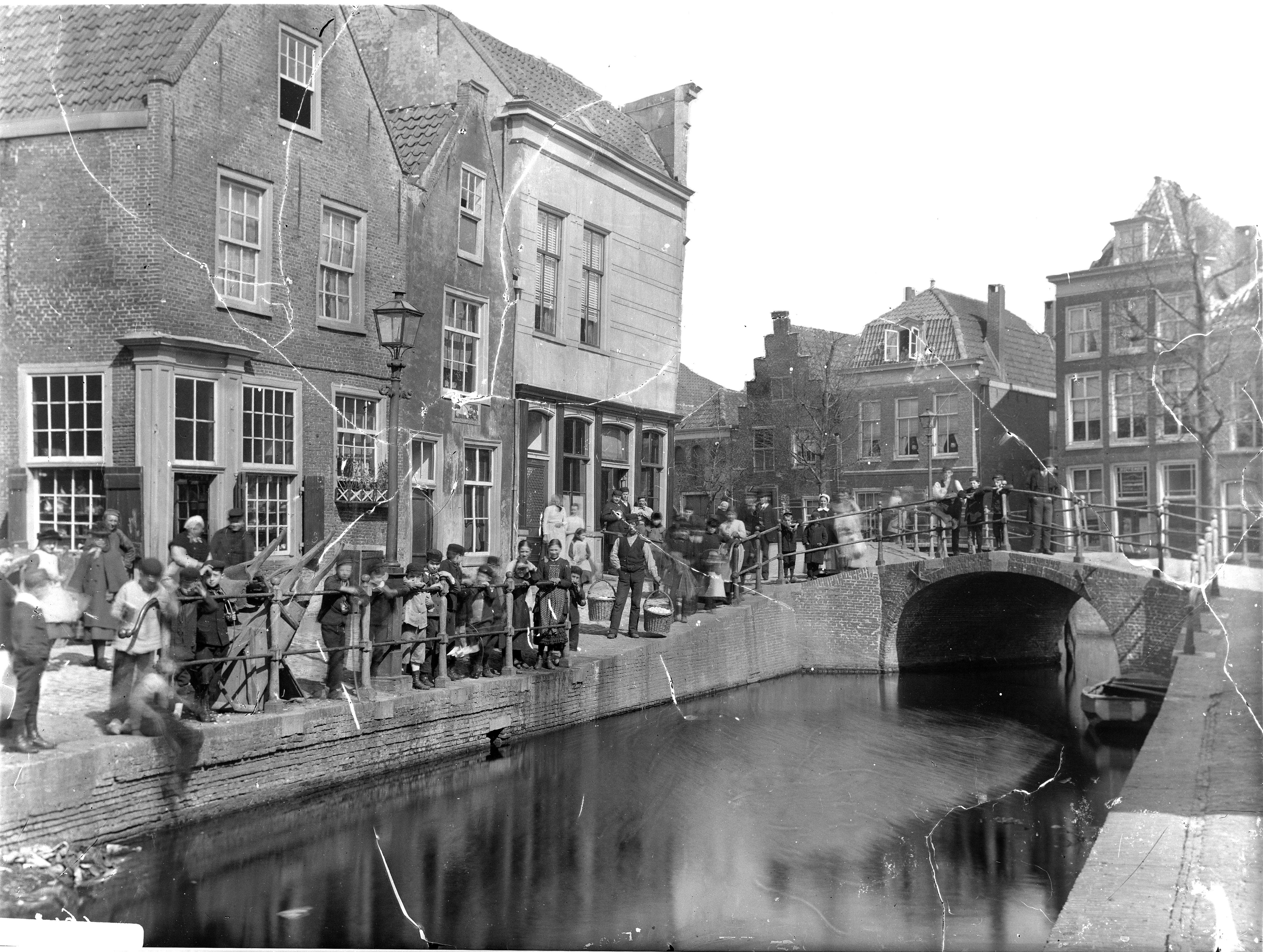 Gezicht op de Zijdgracht, tegenwoordig Korevaarstraat, van de oostzijde naar het Levendaal. Links de Korte Raamsteeg, op de achtergrond de huizen aan de noordzijde van het Levendaal bij de Barbarasteeg. Op de voorgrond de Spekkenbrug. Op straat veel volk.